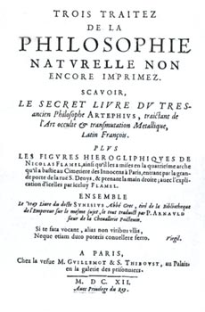 Page de couverture de Trois_traités_de_la_philosophie_naturelle - édition originale du livre des figures hiéroglyphiques de Nicolas Flamel